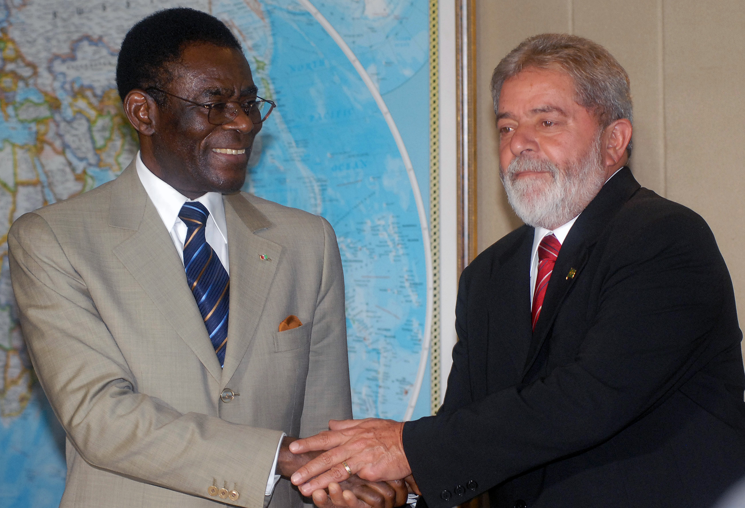 Teodoro Obiang Nguema Mbasogo, President of Equatorial Guinea, with Luiz Inácio Lula da Silva, President of Brasil